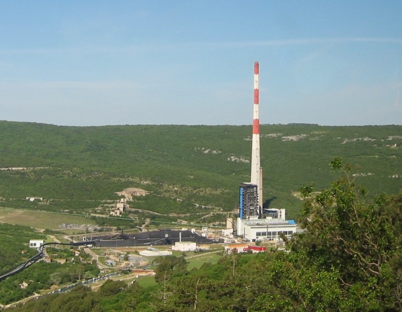 Dimnik termoelektrarne Plomin